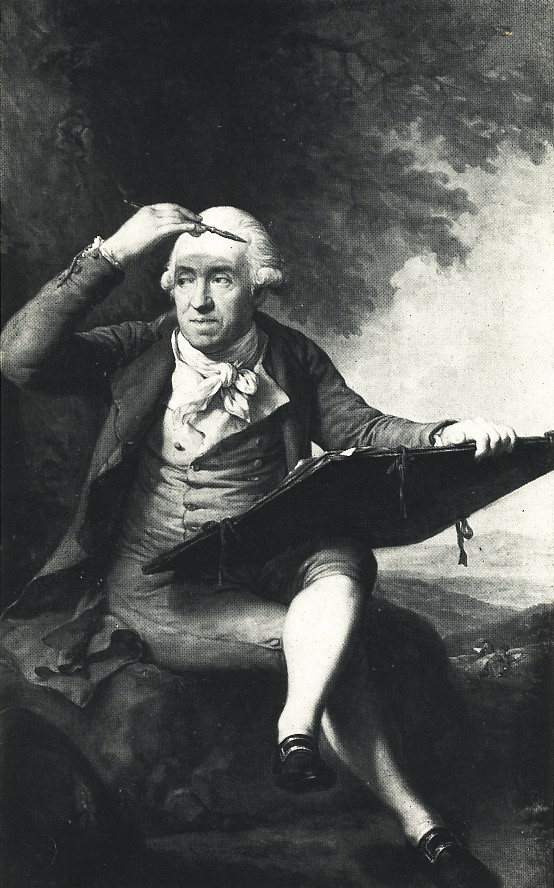 Portrait des Malers und Kupferstechers Adrian Zingg.